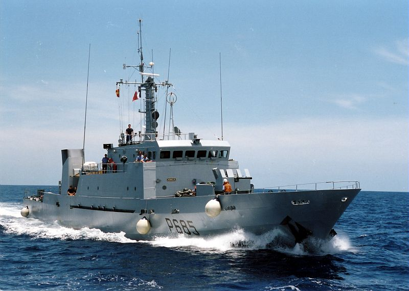 Patrouilleur P400 La Fougueuse P685